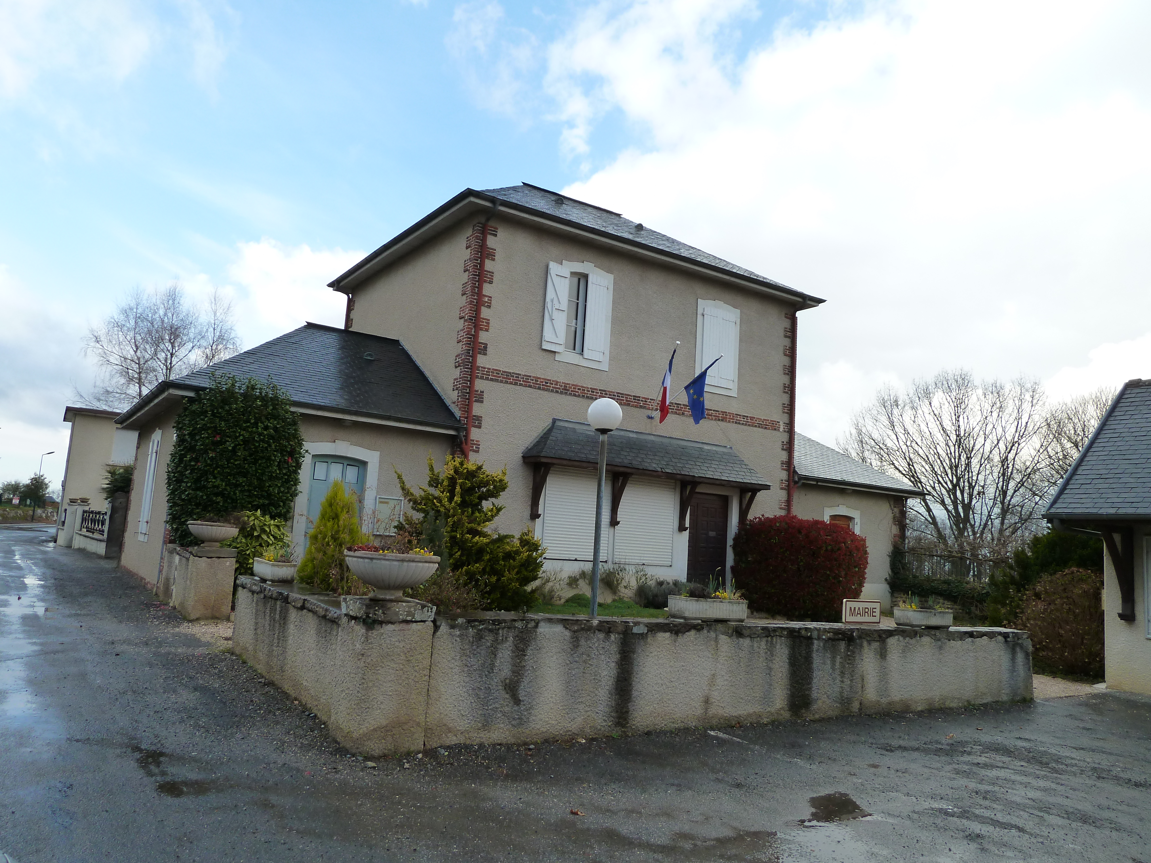 Mairie de Serres-Morlaàs